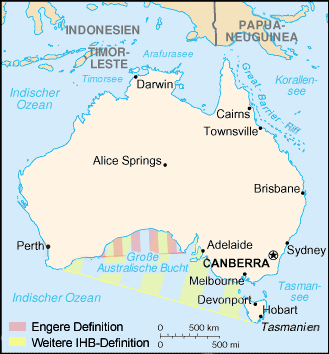 Karte Australiens auf Grundlage von Bild:Australien.png. Markiert wurde die Great Australian Bight nach engerer und weiterer (IHO) Auslegung.